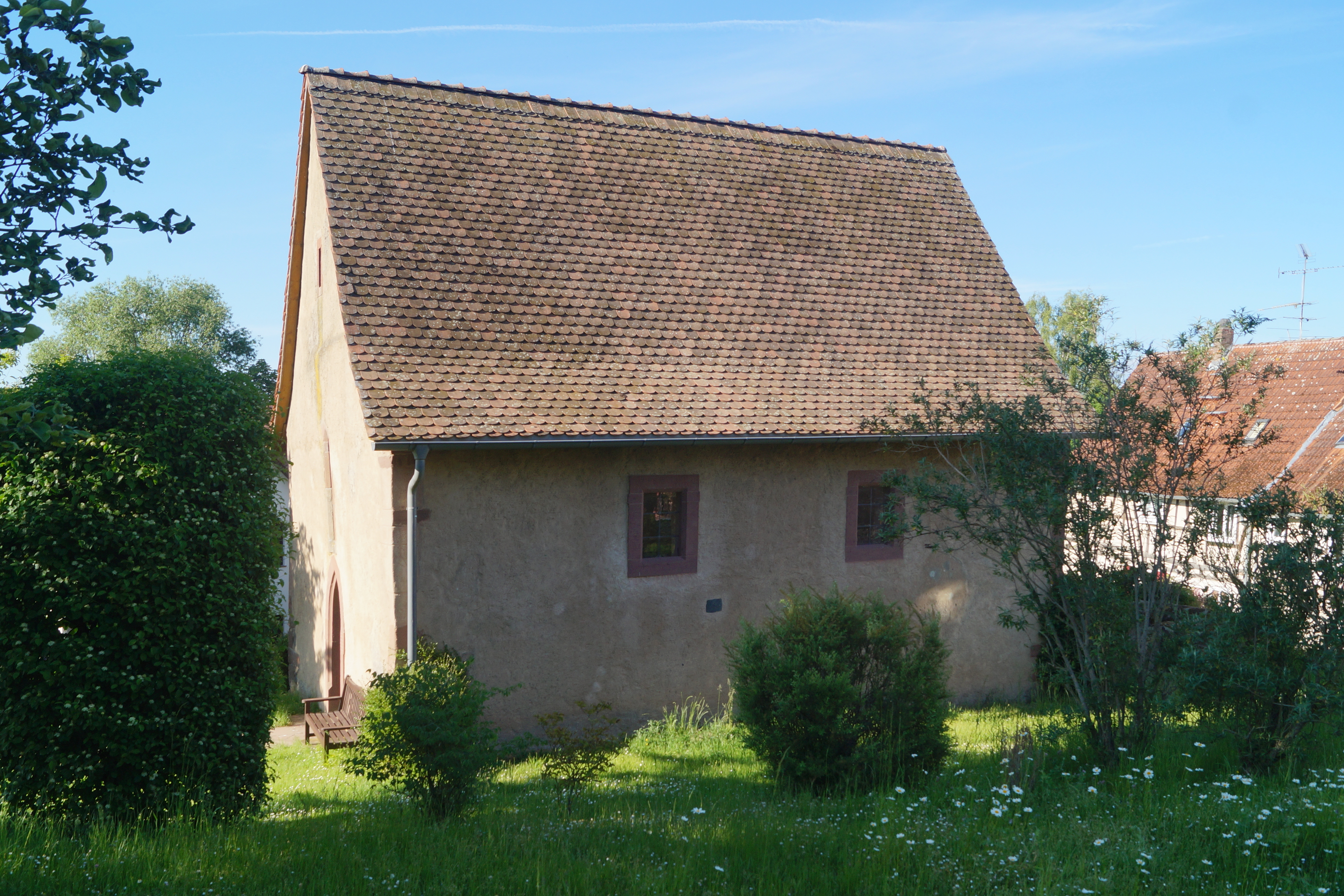 Hirzbacher Kapelle bei Hammersbach, Hessen, Ansicht von Südsüdwest